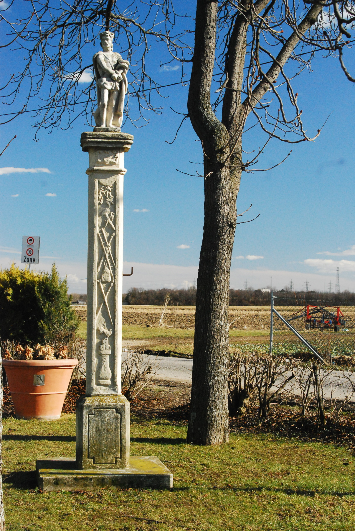 Naturdenkmal „Baumgruppe mit Steinfigur“ an der Kreuzung Leopoldsdorfer Straße / Scheunenstraße in Favoriten.